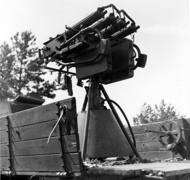 Russ. Vierlings MG.